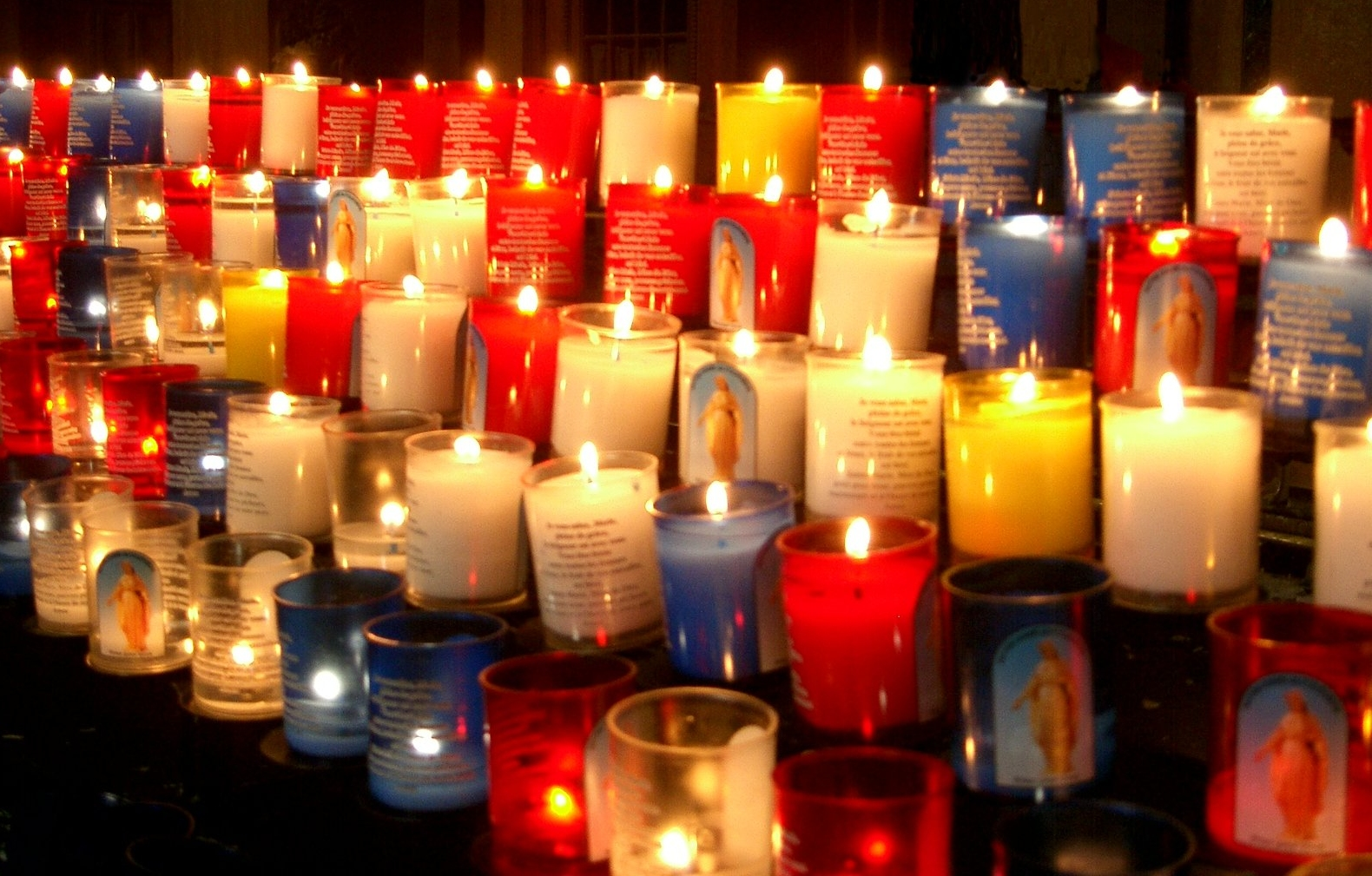 bougies - piété mariale - Basisique ND de Fourvière - Lyon photo personnelle PRA